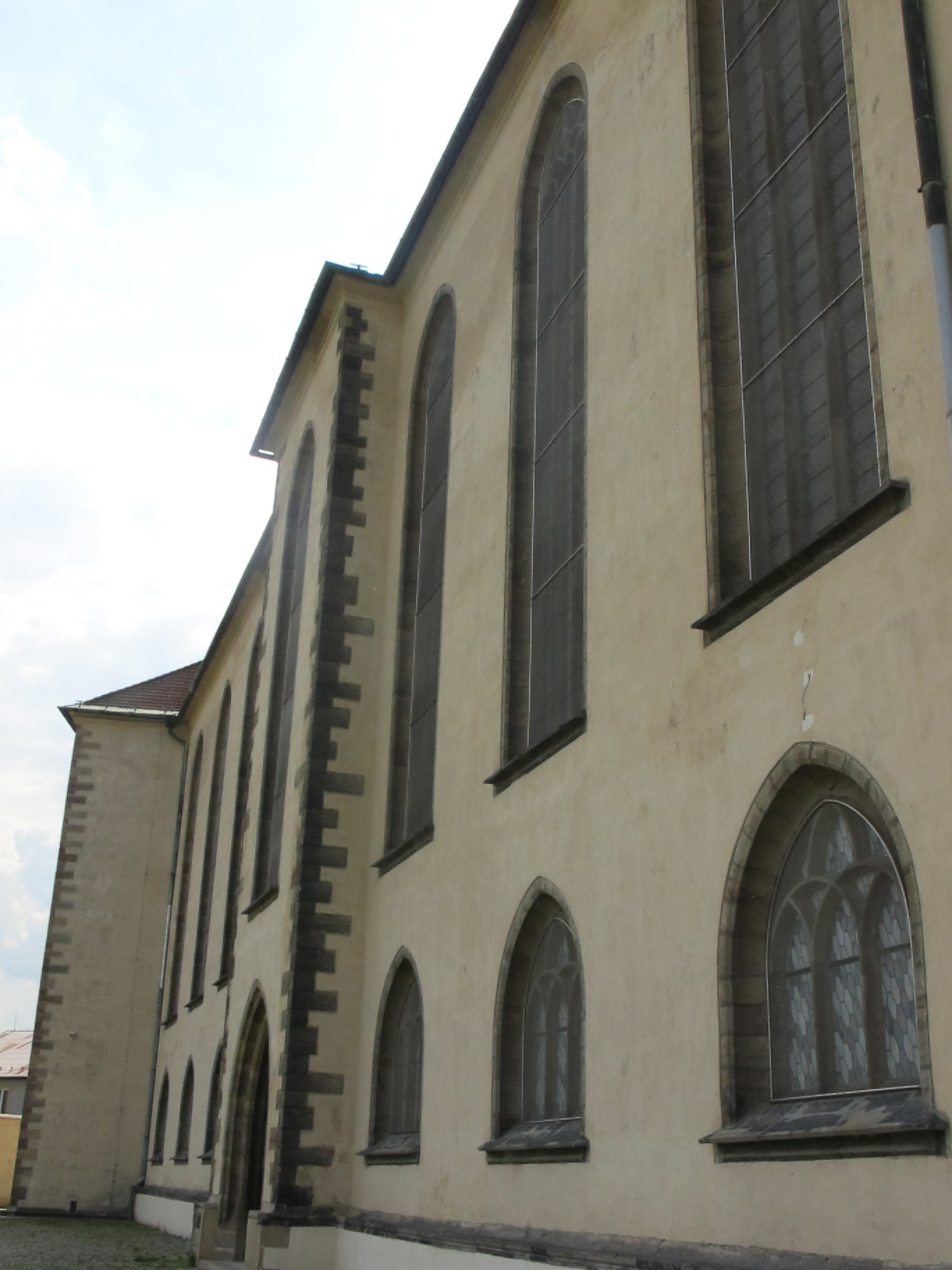 Kostel Nanebevzetí Panny Marie - okna v bývalé severní fasádě (po přesunu ve východní)